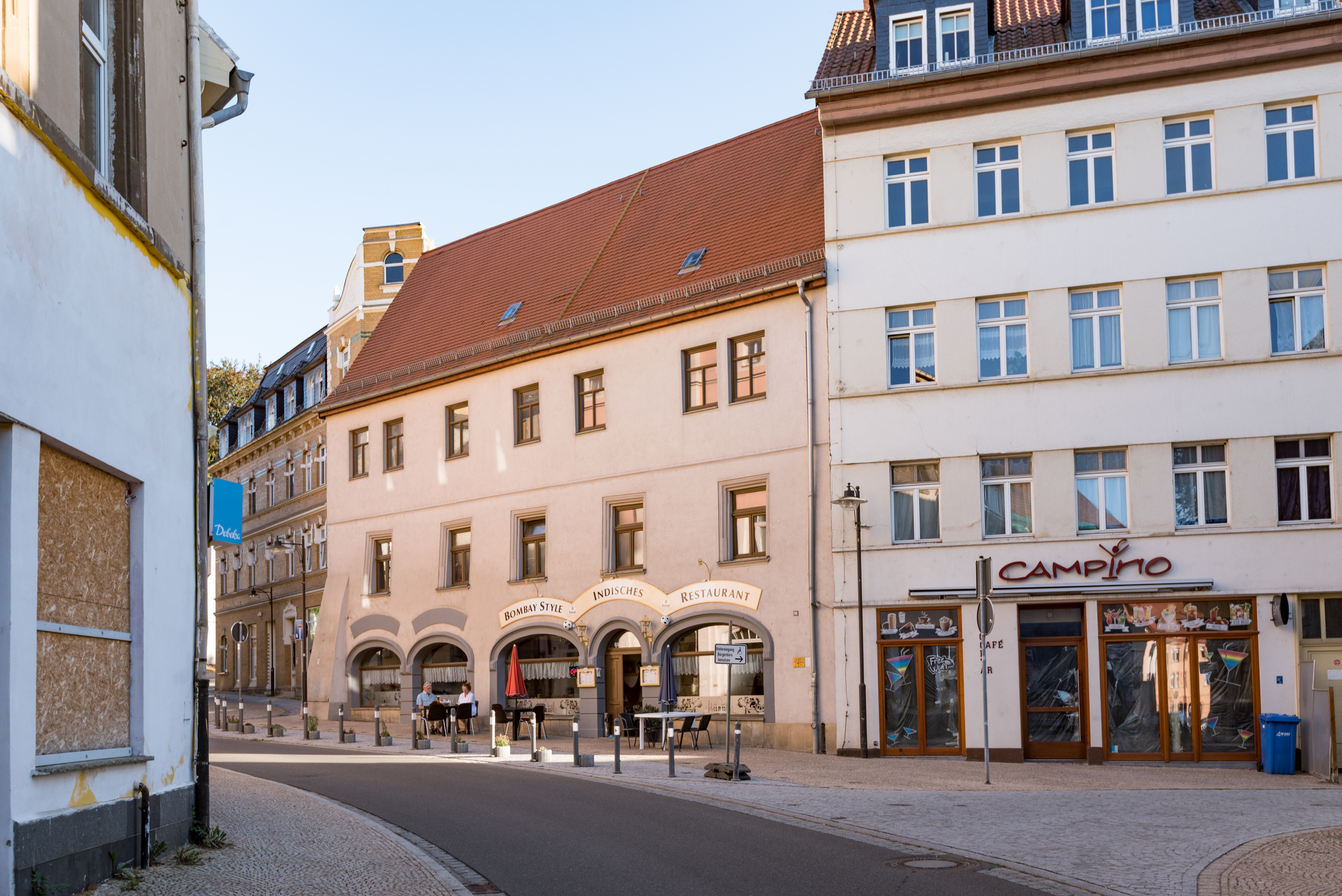 Weißenfels, Große Burgstraße 11